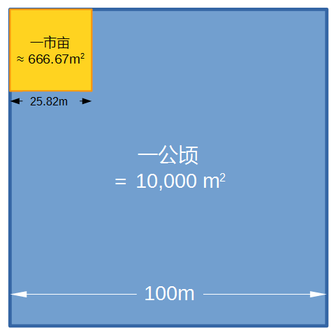 一市亩（中华人民共和国现行）与一公顷（国际标准）之比较。定义：十五市亩等于一公顷整。